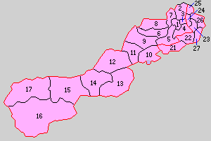 三重県飯高郡・飯野郡の町村制時点の町村。